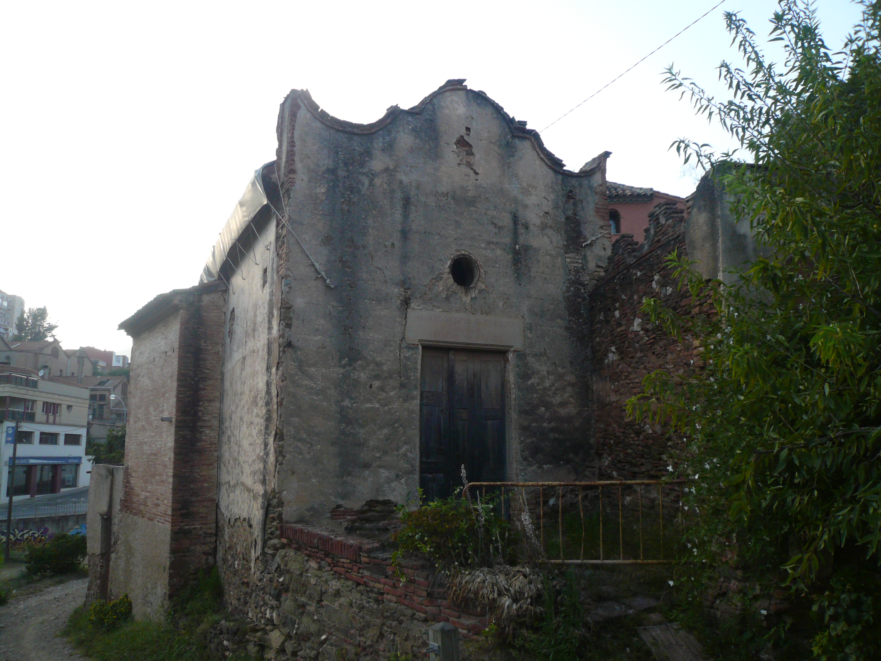 Capella Miquel a la Masia de Can Molins. Camí de Sant Climent a Viladecans (Sant Climent de Llobregat). Object location41° 20′ 05.86″ N, 2° 00′ 07.44″ E